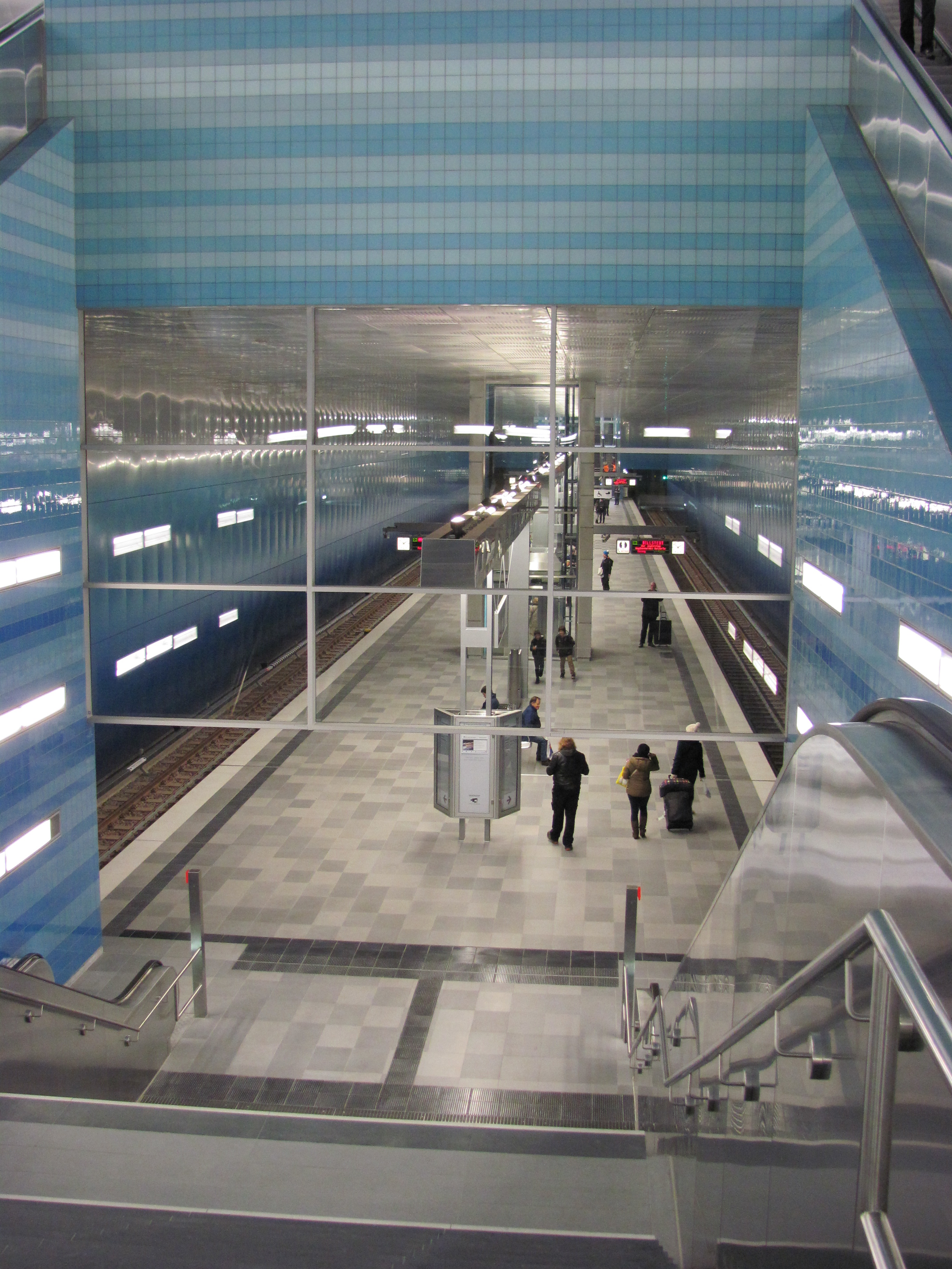 U-Bahnhof Überseequartier, Bahnsteig von der Zwischenebene aus gesehen